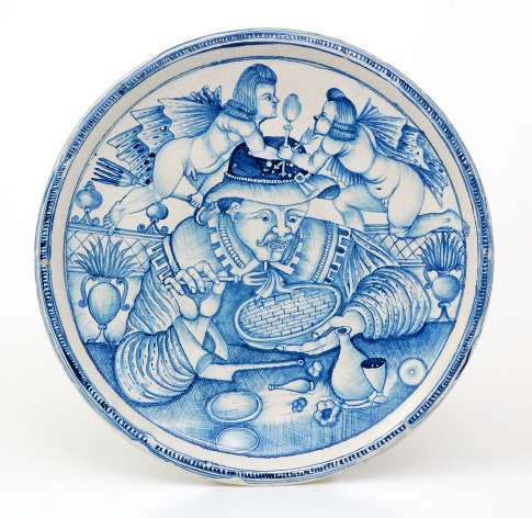 Piatto dipinto con un "Mangiamaccheroni". Laterza, ultimo quarto del XVII secolo.